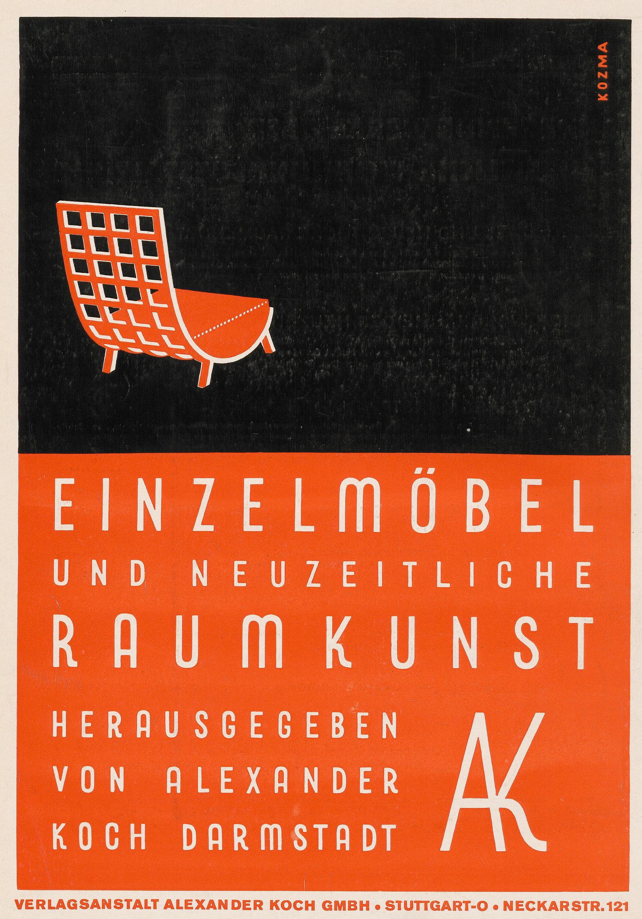 Werbeanzeige für Alexander Koch - Einzelmöbel und neuzeitliche Raumkunst. Darmstadt: Verlagsanstalt Alexander Koch, 1930. Design: Lajos Kozma